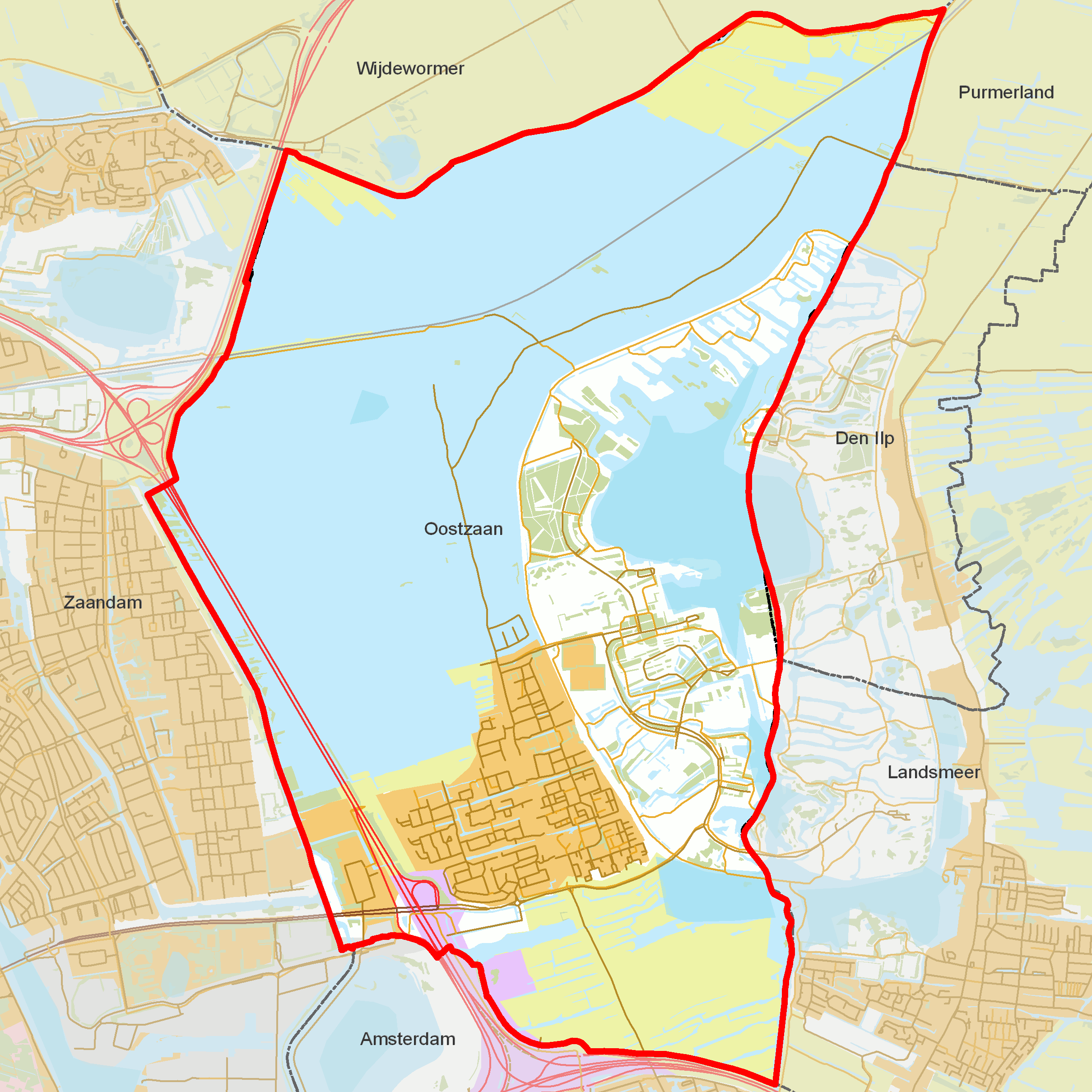 BAG woonplaatsen - Gemeente Oostzaan.png